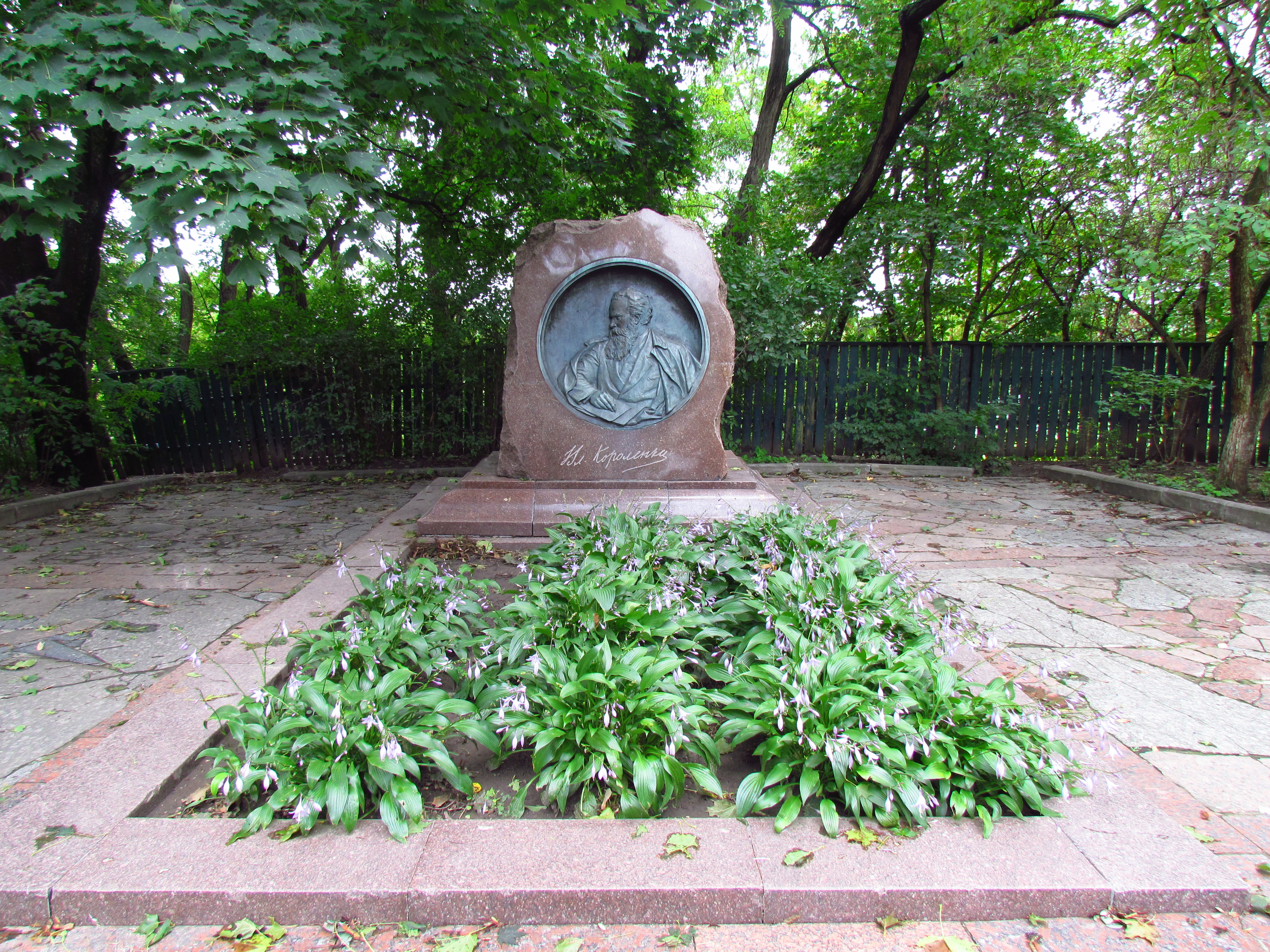 Полтава. Могила В.Г.Короленка